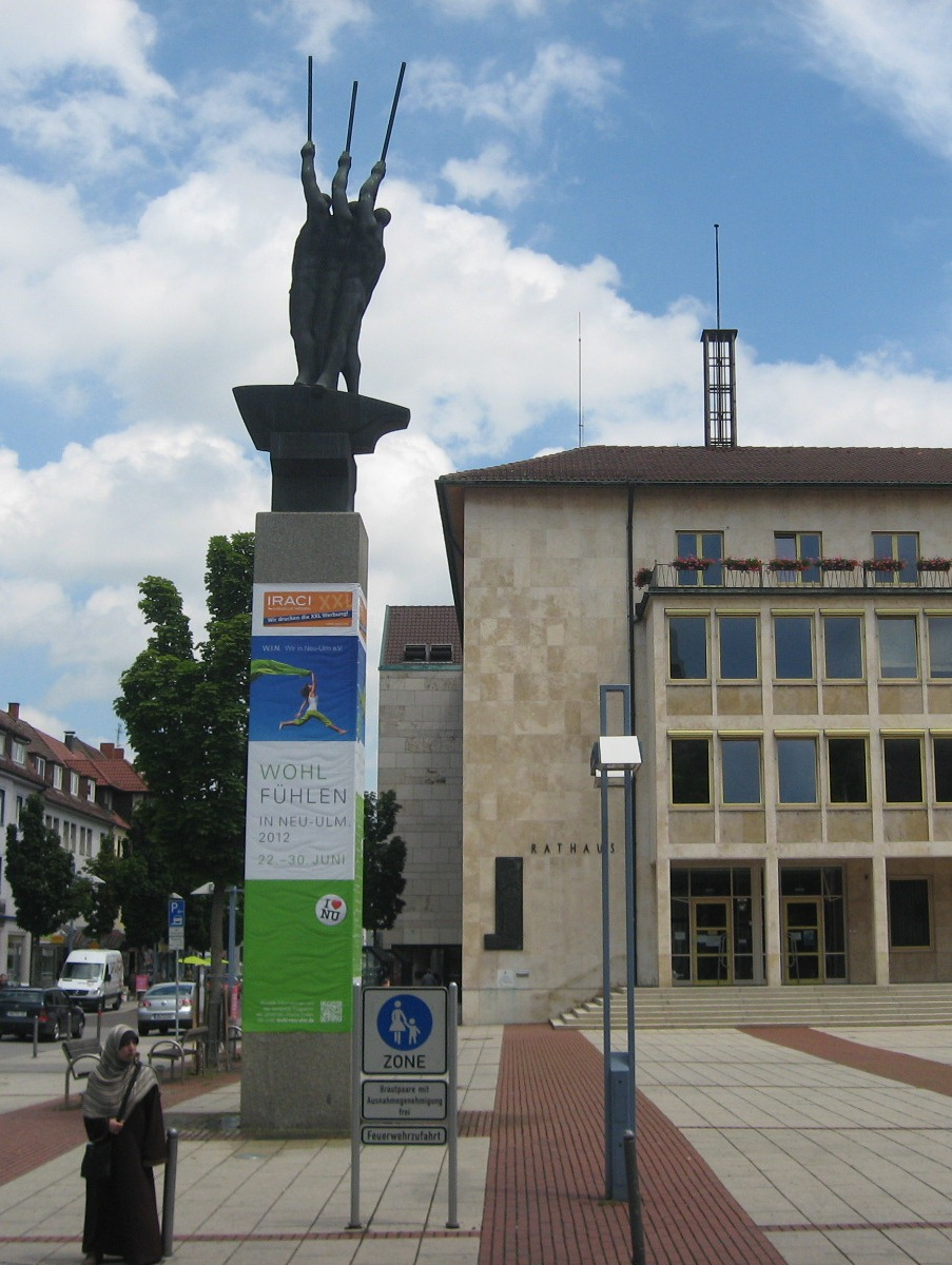 Skulptur "Drei Männer im Boot" vor dem Rathaus in Neu-Ulm